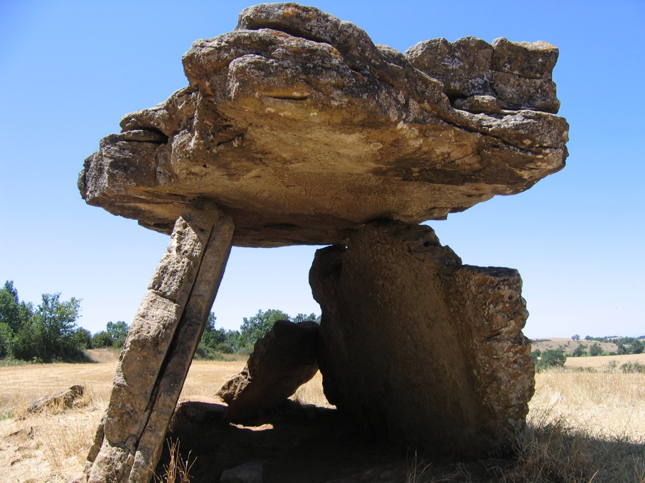 Description: Le fameux dolmen de Tiergues, Aveyron, France. Ce dolmen est un exemple typique: son tumulus a complètement disparu (érosion, pillage...) et ne reste que la charpente du tombeau lui-même. Source: Hugo Soria Licence: GFDL Hugo Soria